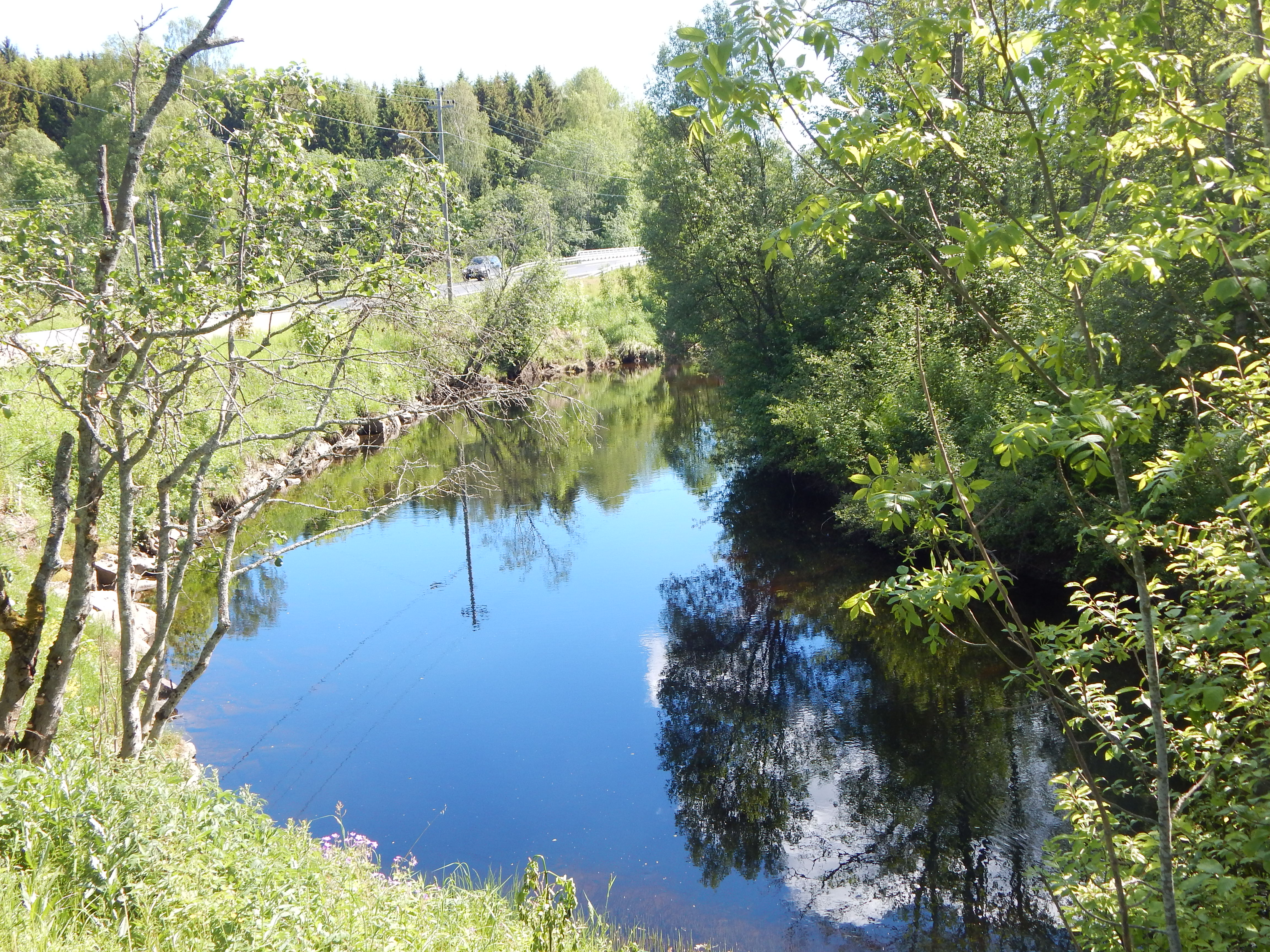 Sørkedalselva like ved Tangenveien